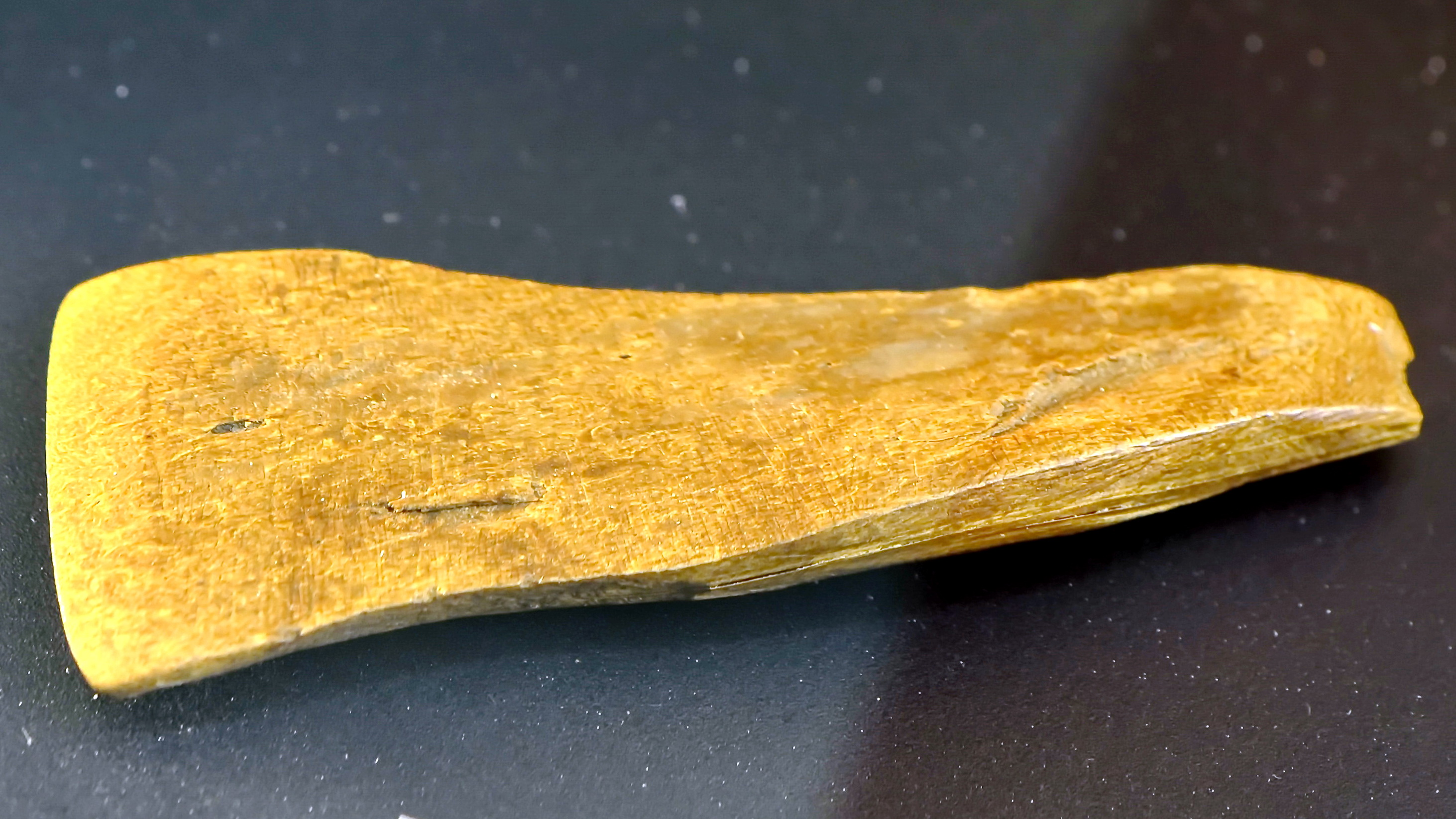 Ausstellung Archäologie im Parkhaus Opéra, Exponat aus der Grabung Parkhaus Opéra in Zürich (Switzerland) : Horgener Kultur, Knochenmeissel.